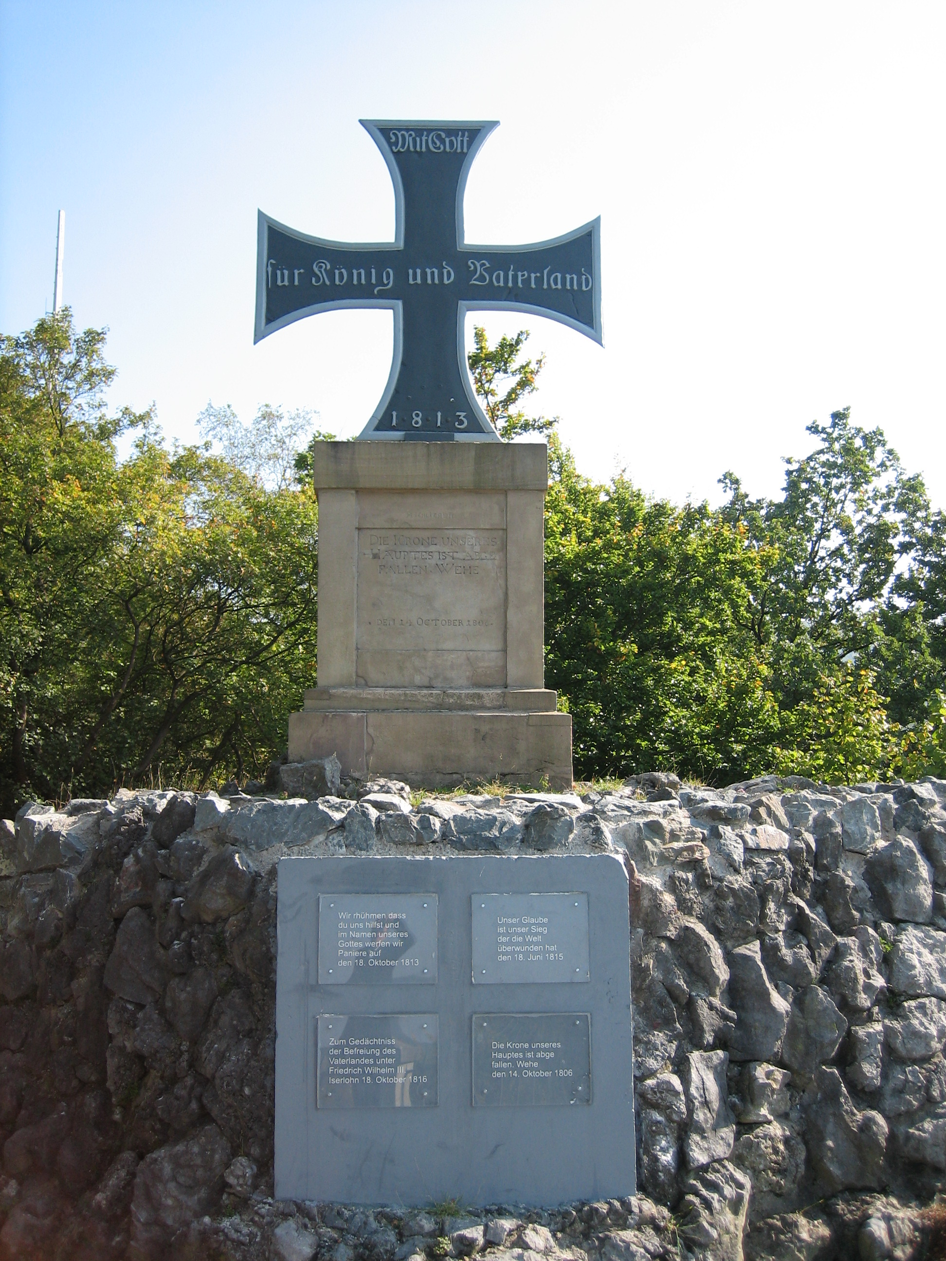 Eisernes Kreuz Iserlohn, Gedenken an Befreiungskriege This image shows a heritage building in Germany, located in the North Rhine-Westphalian city Iserlohn (no. 16).